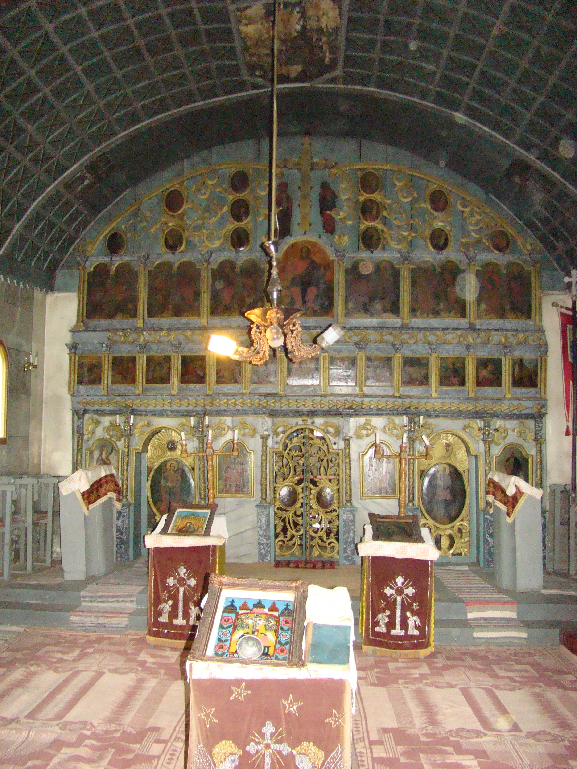 Biserica „Sf.Gheorghe” din Tăut, Bihor